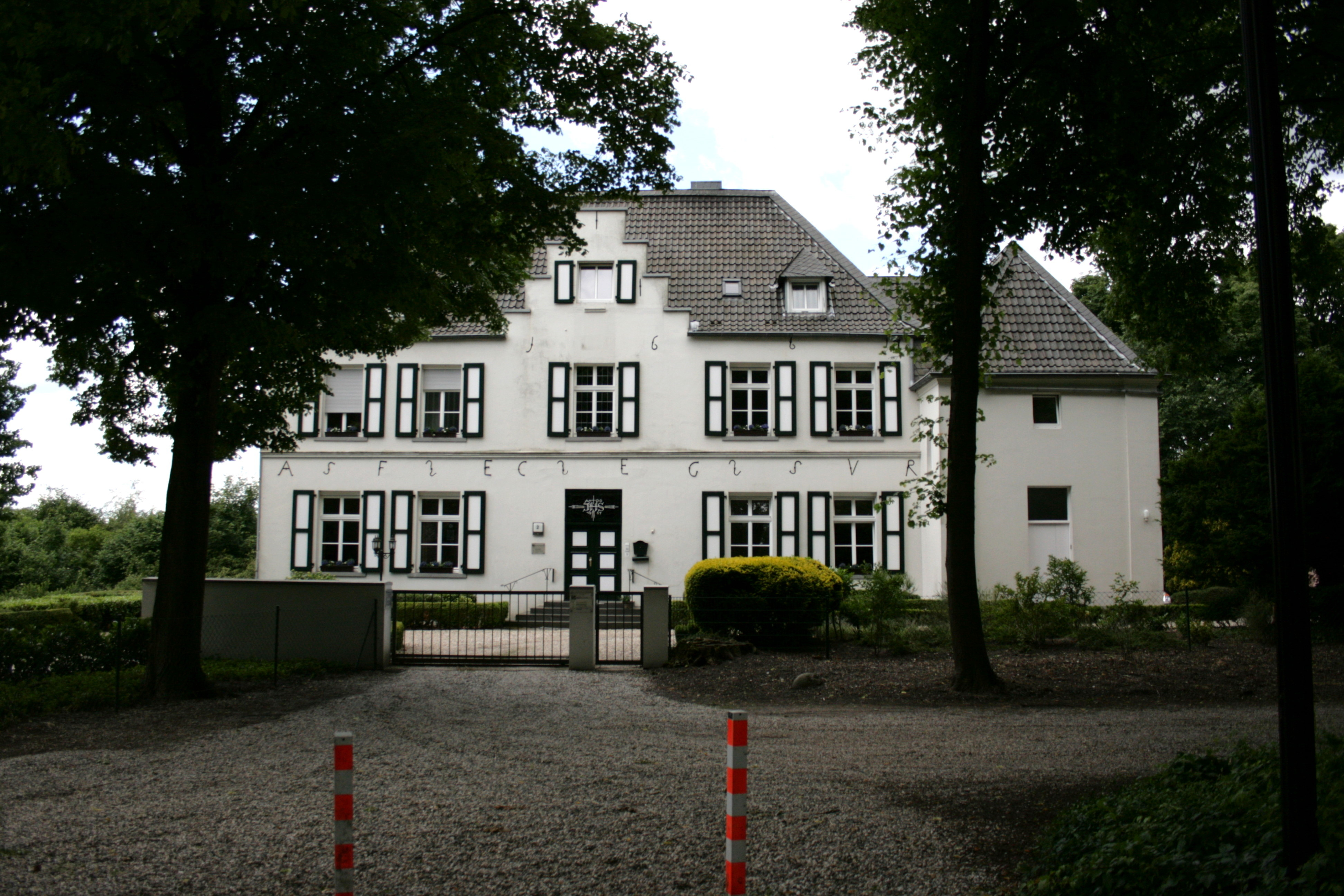 Stanislauskolleg, Freiheit 2, Hochelten, Emmerich am Rhein